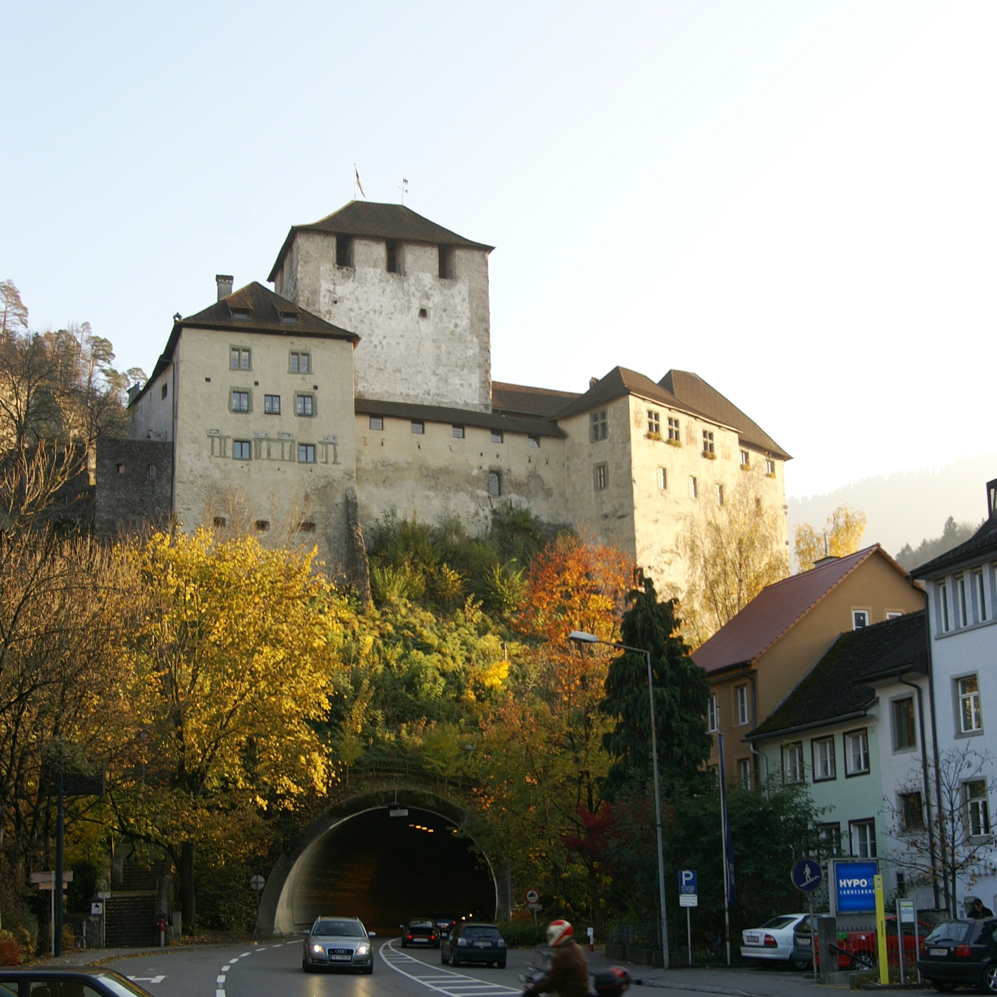 die Schattenburg in Feldkirch, Vorarlberg 12.Jhdt.